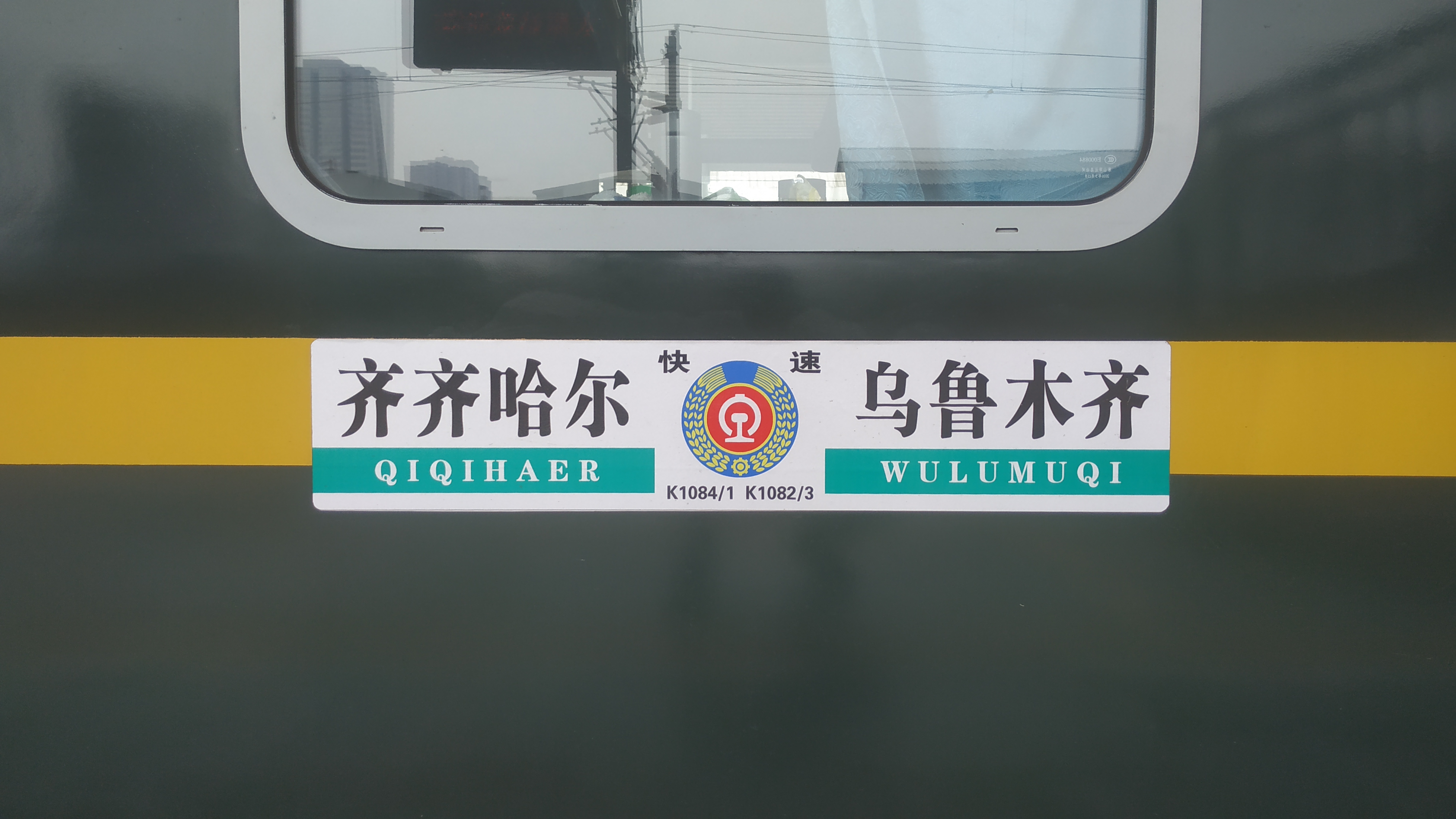 中文（中国大陆）: 齐齐哈尔到乌鲁木齐K1084